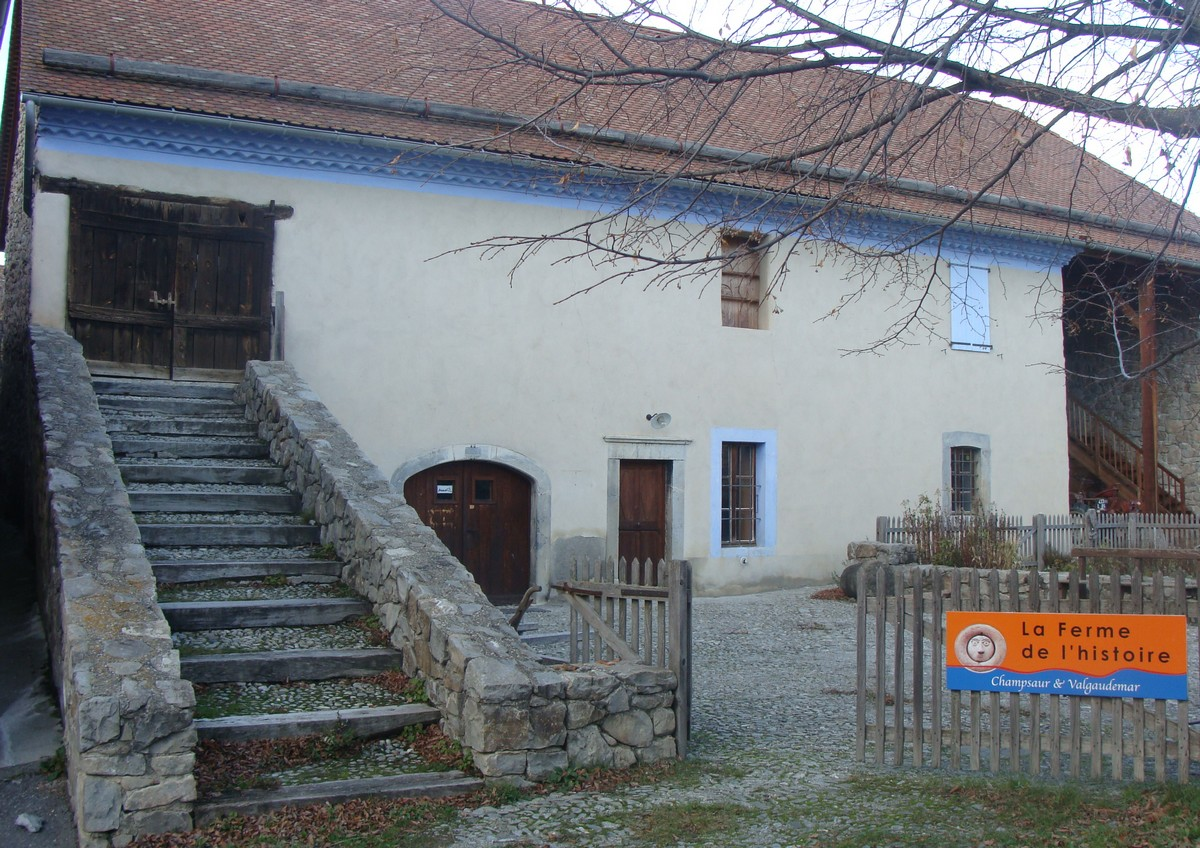 La "ferme de l'Histoire", partie du "musée éclaté" du Champsaur, à Pisançon. Noter le "montage" en escalier, à gauche, et la cour pavée en têtes-de-chats.